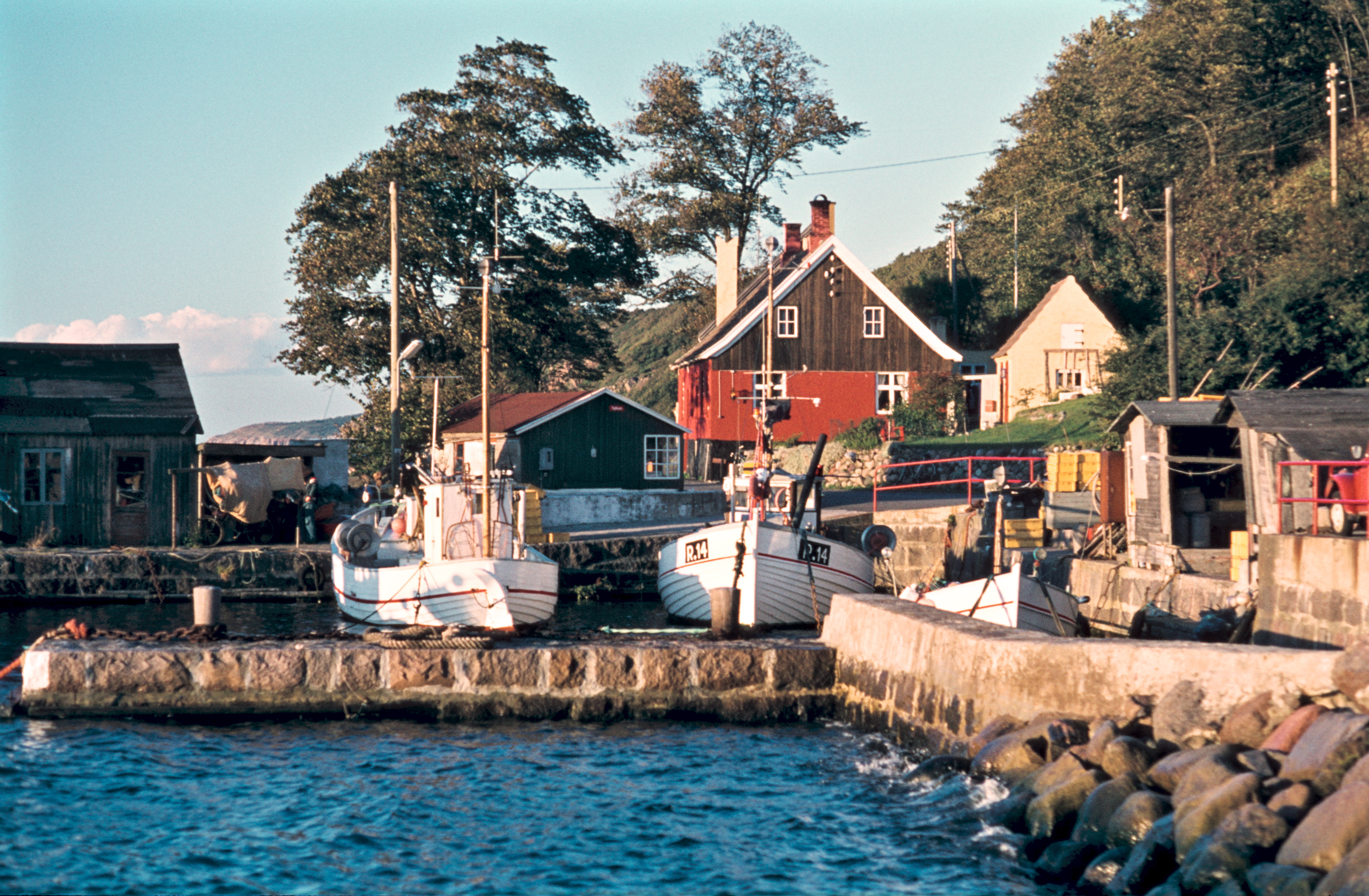 Teglkås havn, 1978